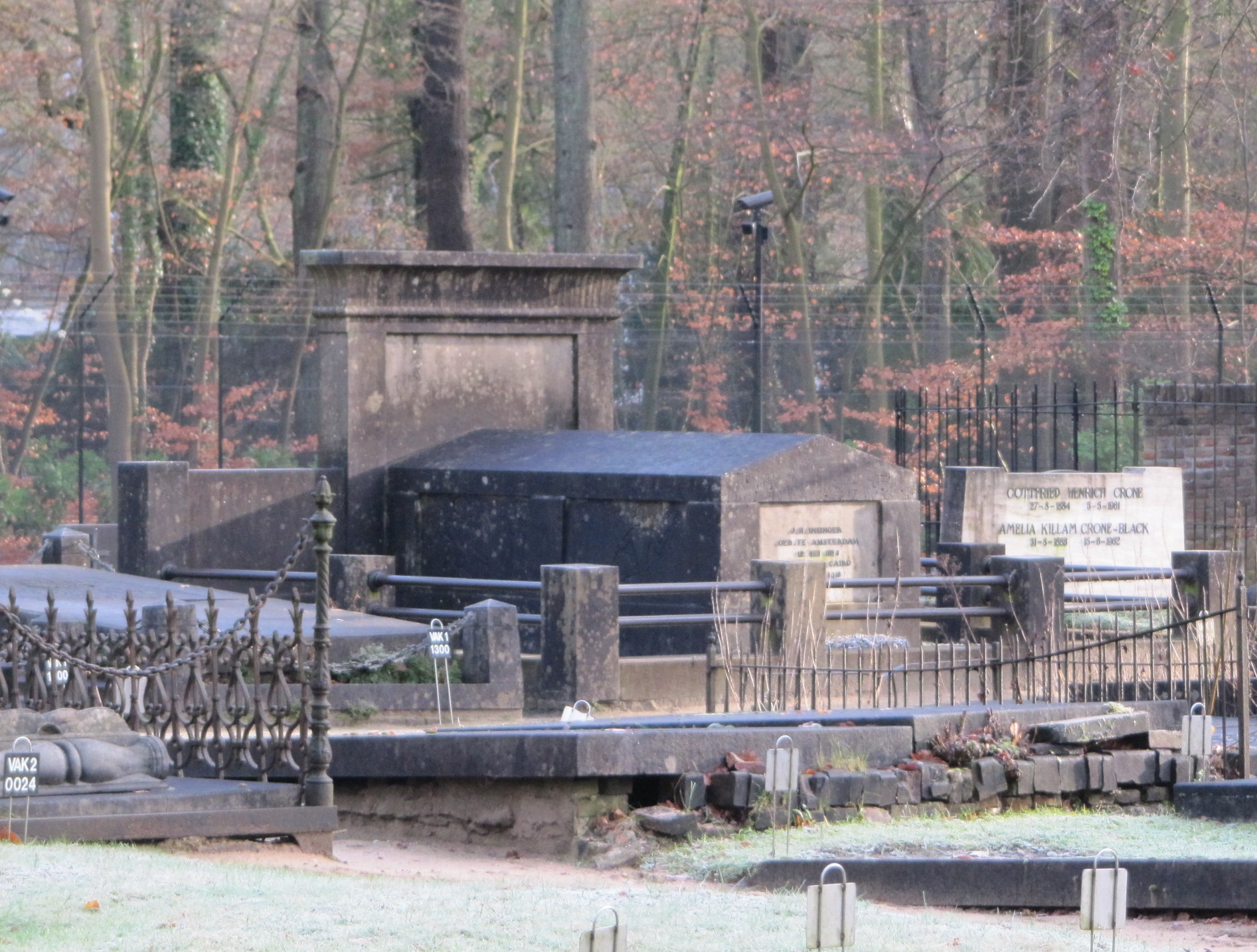 RM511728 Lage Vuursche - graftome Insinger.jpg